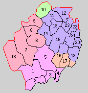 千葉県夷隅郡の町村。